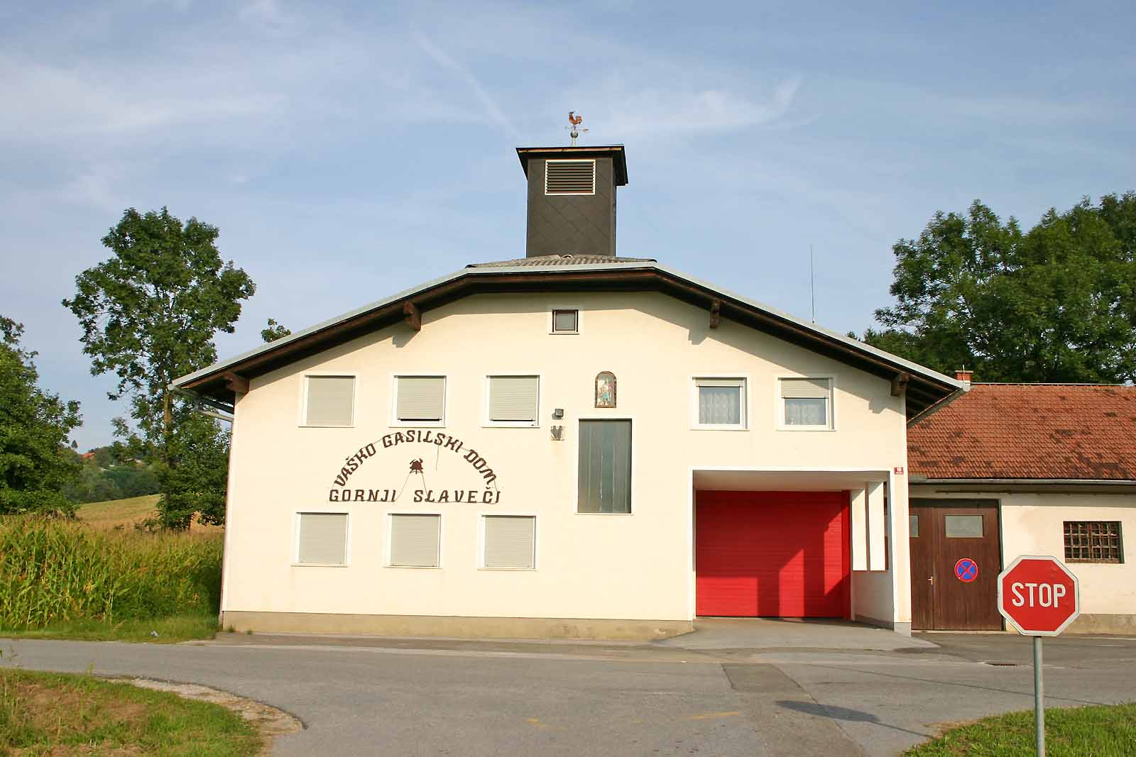 Prostovoljno gasilsko društvo Gornji Slaveči. Volunteer fire Gornji Slaveči. Freiwillige Feuerwehr Gornji Slaveči.